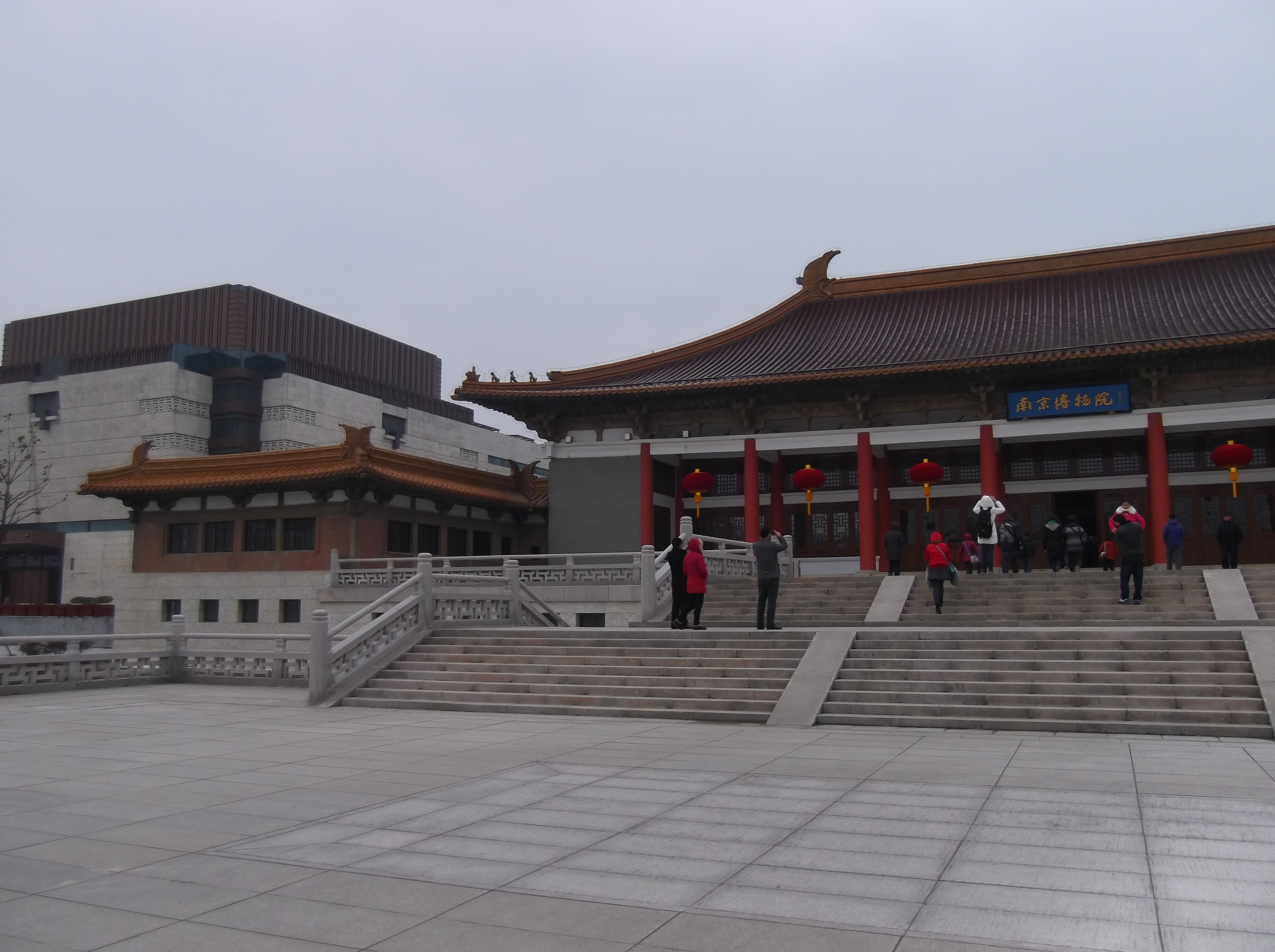 Xuanwu, Nanjing, Jiangsu, China